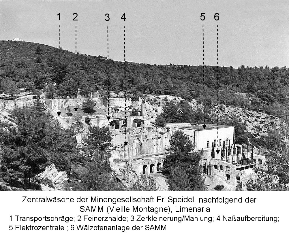 Ruinen der Zentralaufbereitung Metallia-Bucht, Limenaria